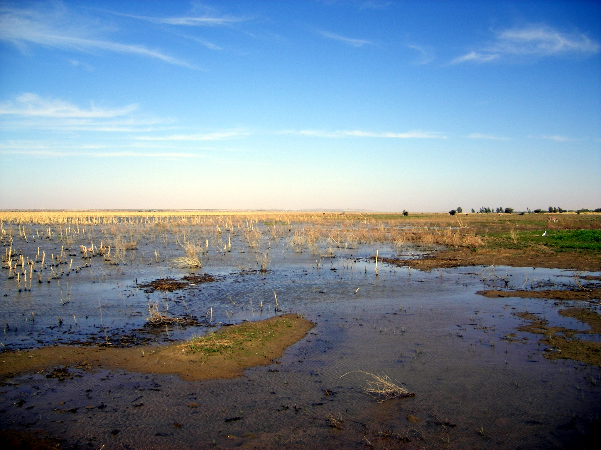 Reisanbau_Goundam.jpg